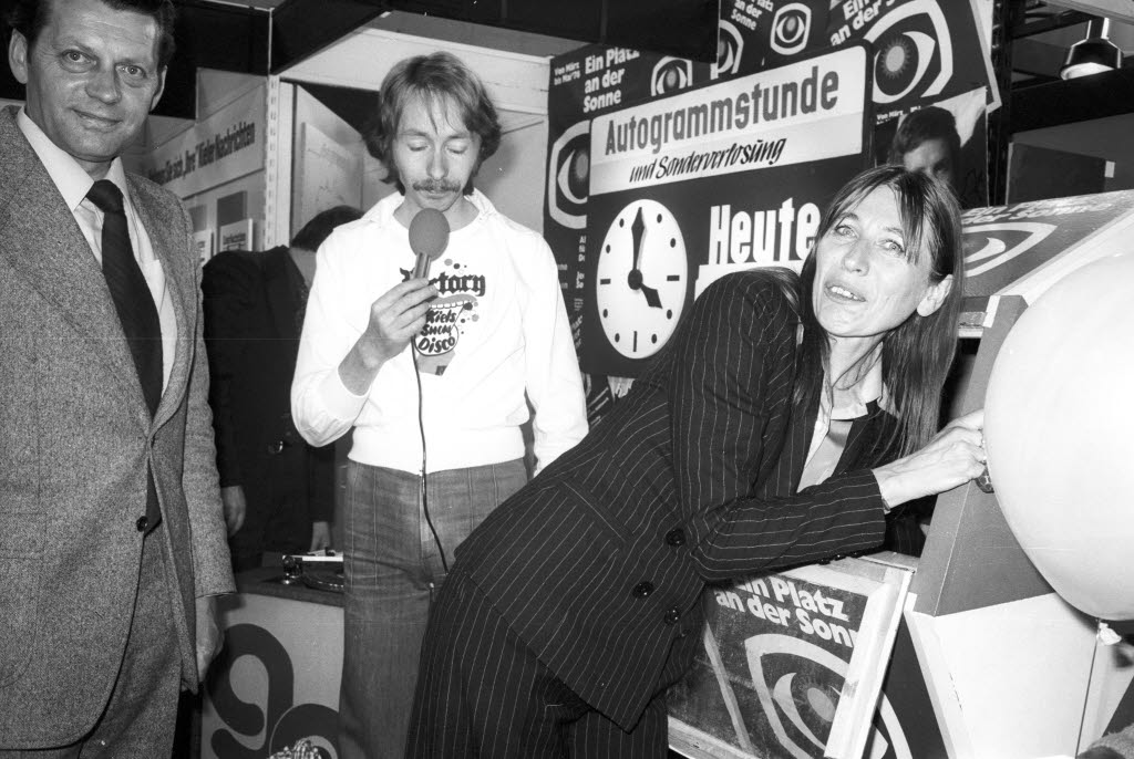 Schauspielerin und Sängerin Helga Feddersen (1.v.r.) ist zu einer Sonderverlosung und Autogrammstunde bei Discjockey Klaus Bunsen (2.v.r). Im Bild links des Landeslandwirtschaftsminister Günter Flessner.